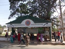 bus stop